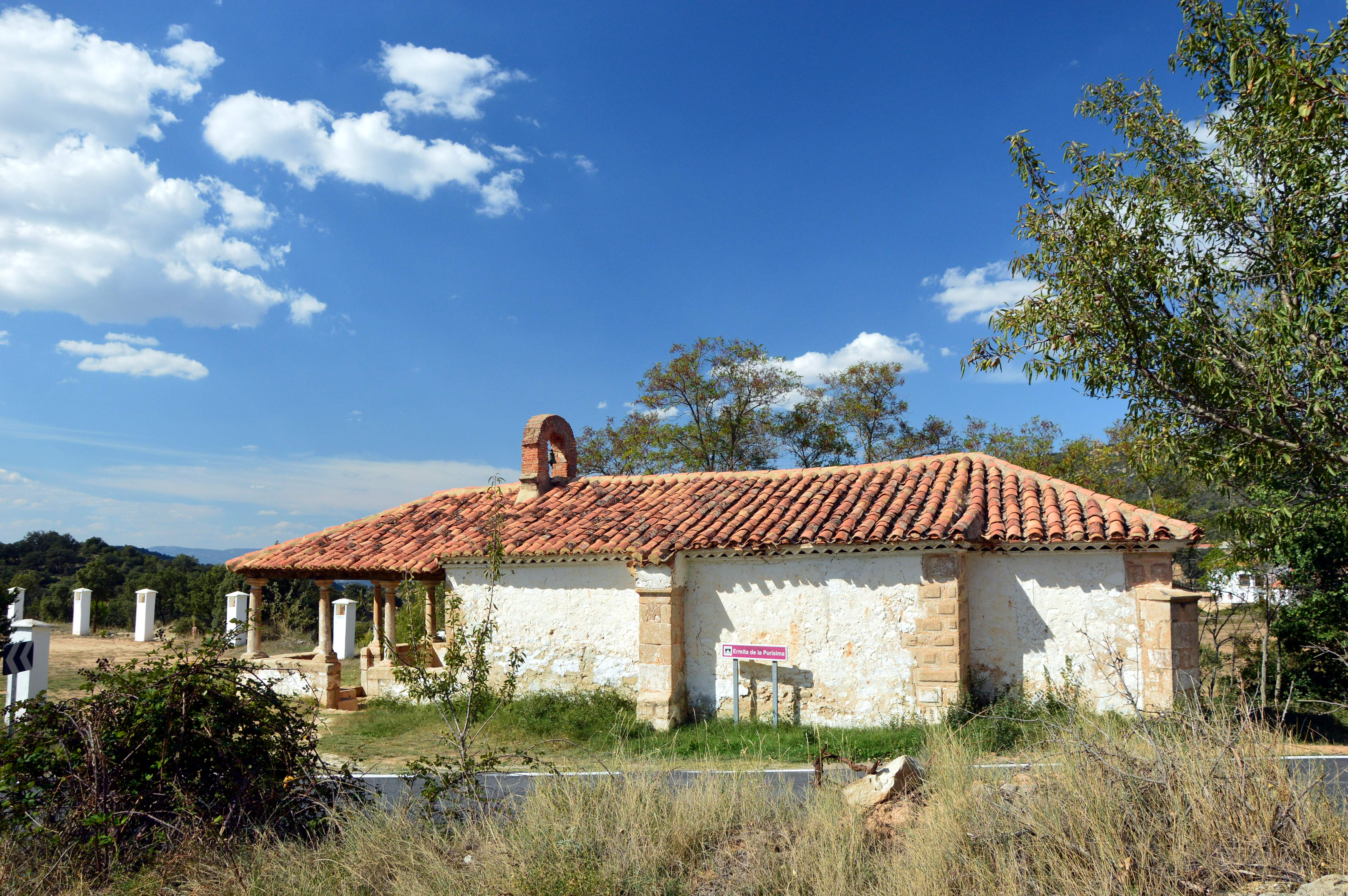 Vista general (oriental) de la Ermita de la Purísima en Puebla de San Miguel (Valencia), 2018.